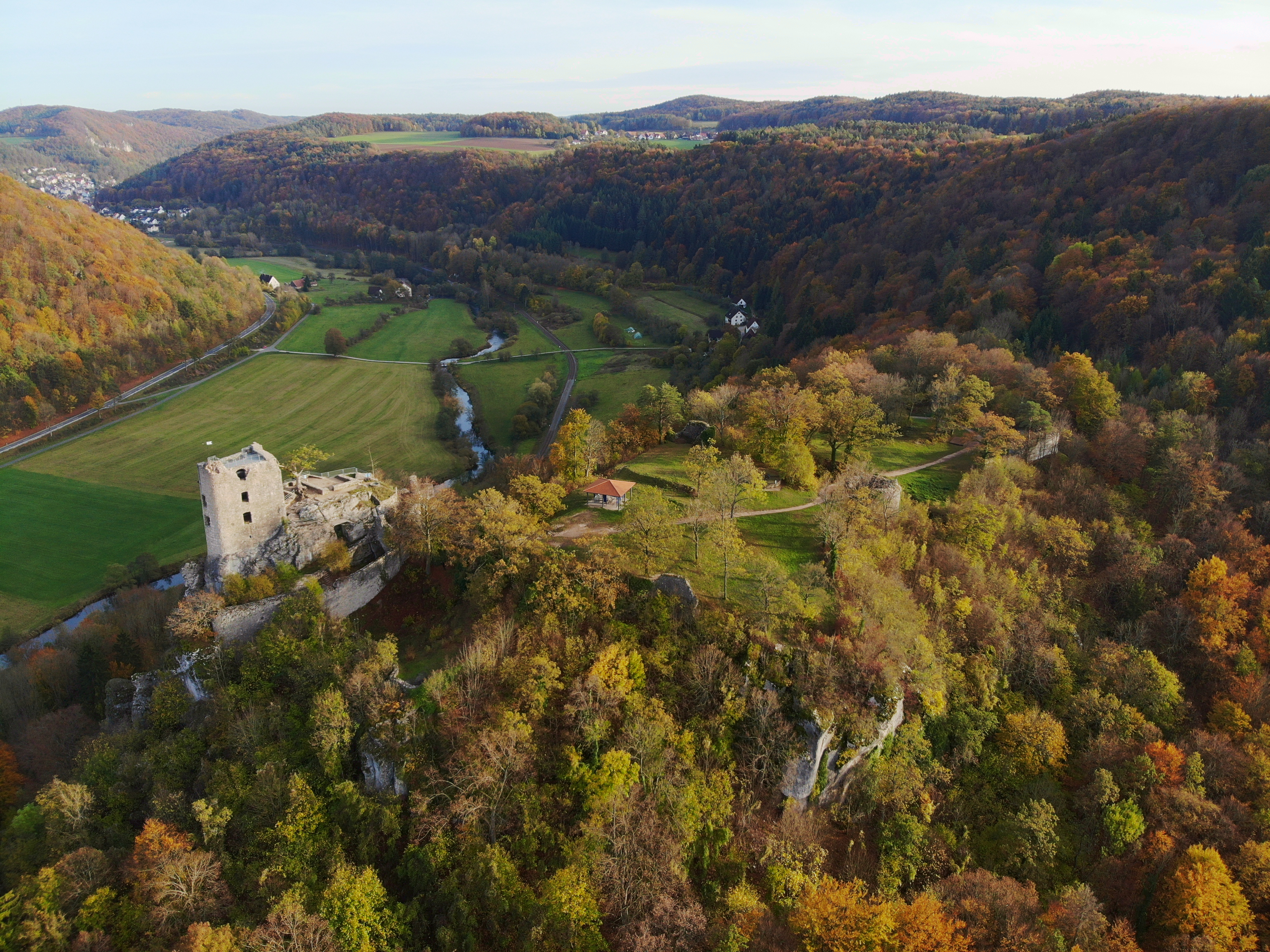 Burgruine Neideck Luftaufnahme (2019)